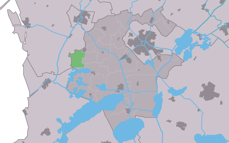 Kaartsje fan himrik fan Greonterp